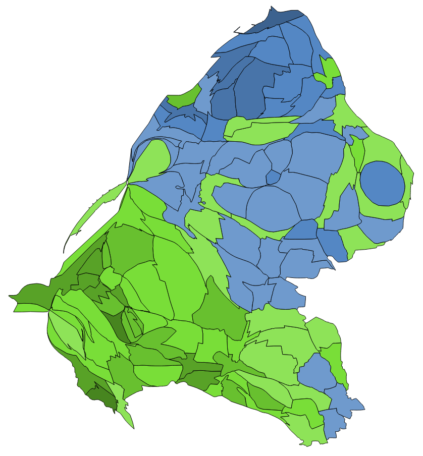 顏色對照表